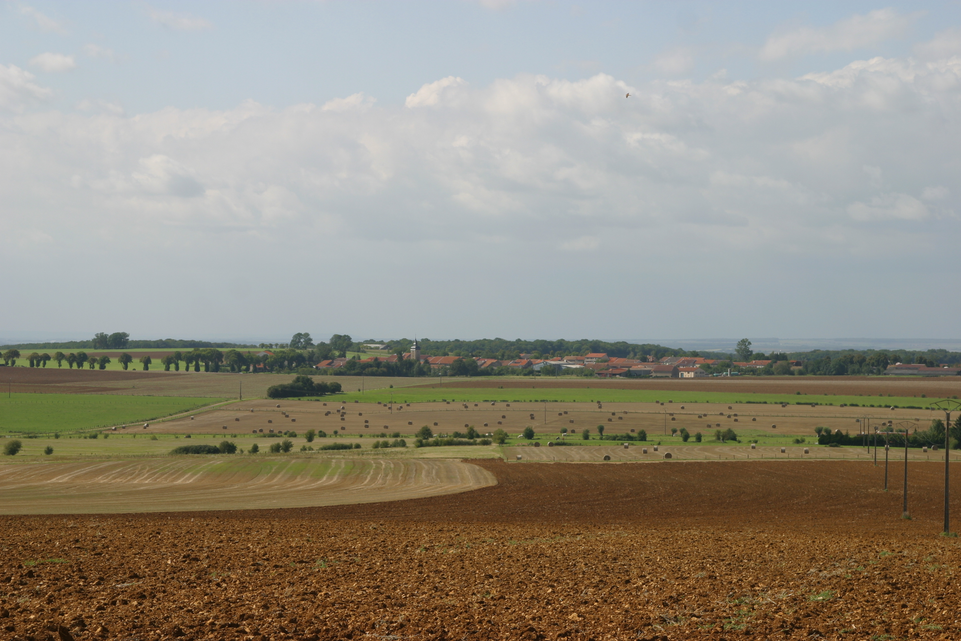 Schlachtfeld von Mars-la-tour 2011, Blick vom Feldherrnhügel auf Vionville